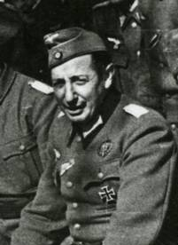 Cor. Rodrigo, García [...], García Allés. (aproximadamente 1941-1943)